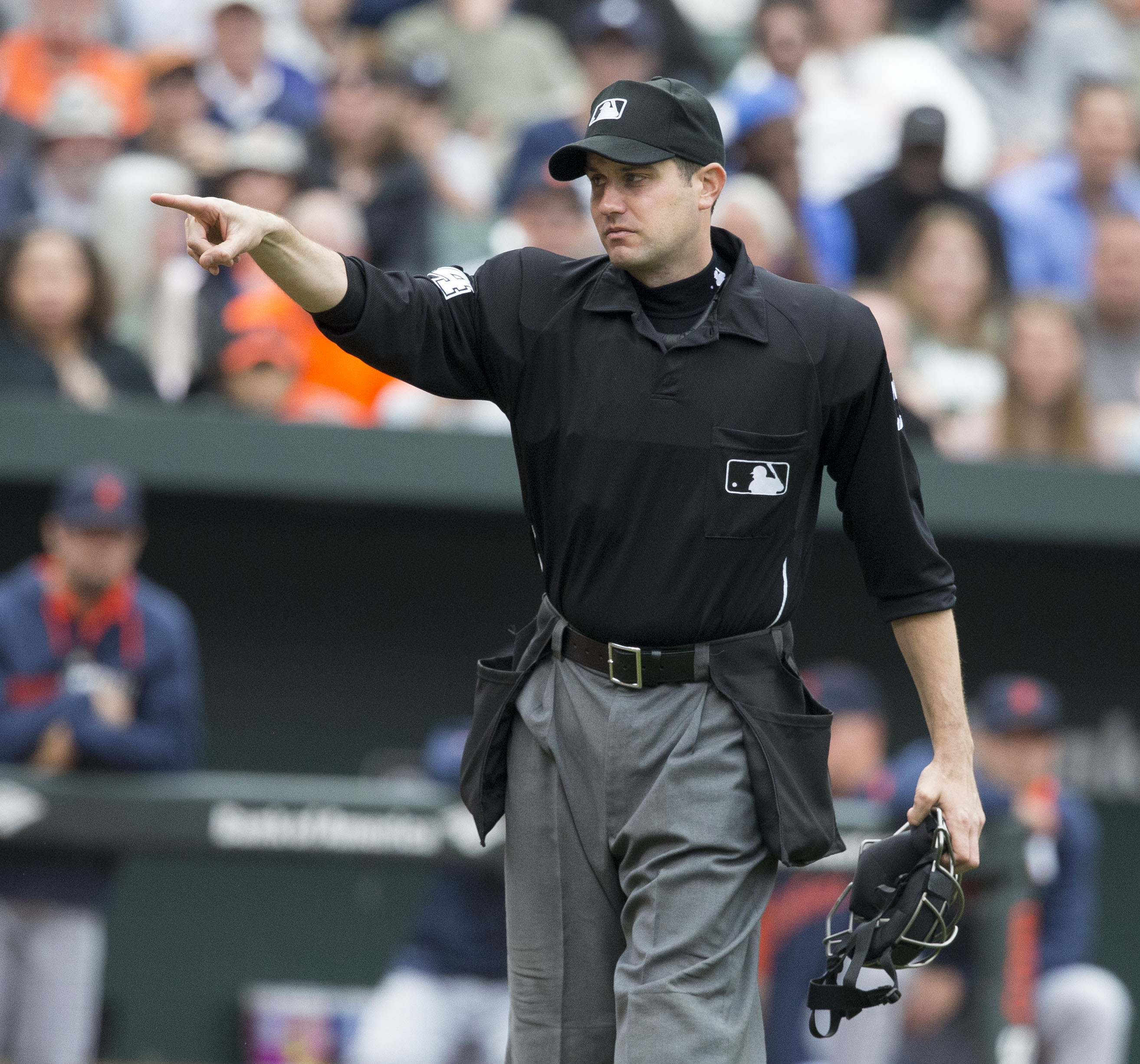 John Tumpane